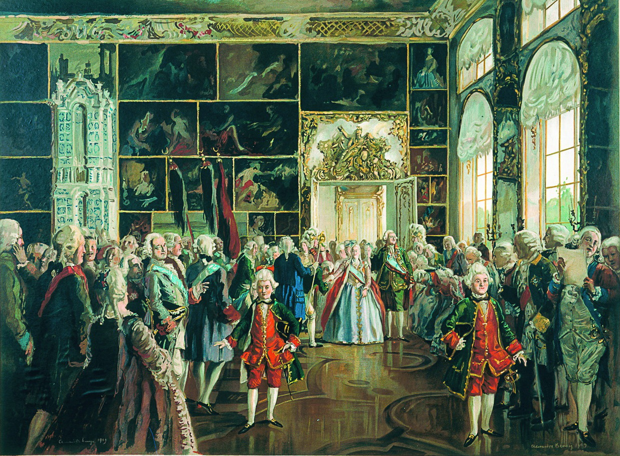 А.Н. Бенуа. Выход императрицы Екатерины II - 1912